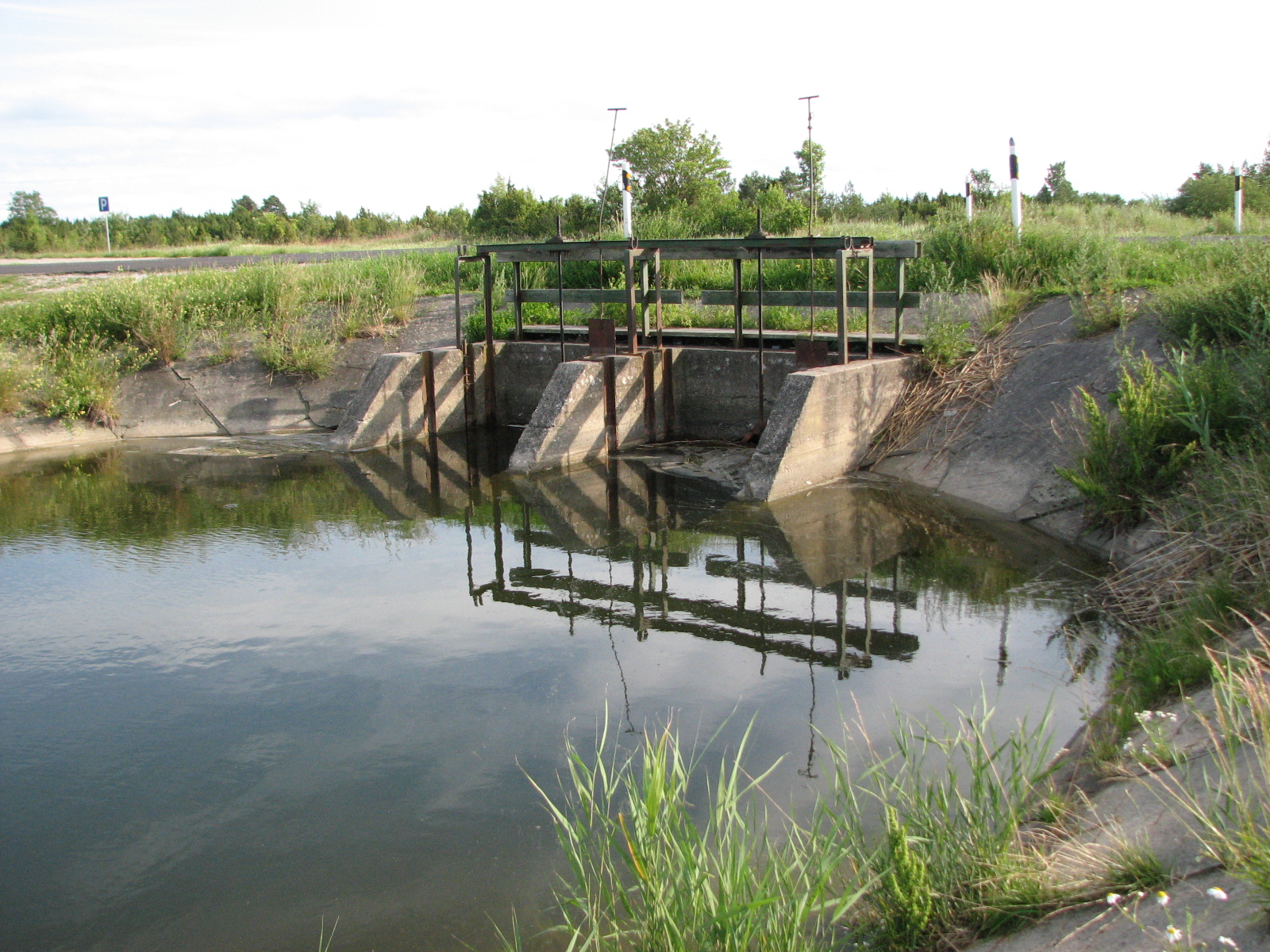 Käina Bay, Hiiumaa, Estonia. Summer 2008